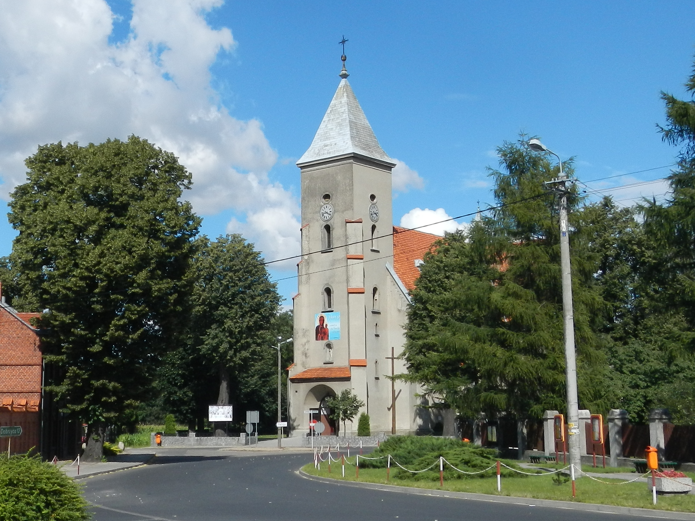 Rozdrażew, kościół par. p.w. św. Jana Chrzciciela, pocz. XVII